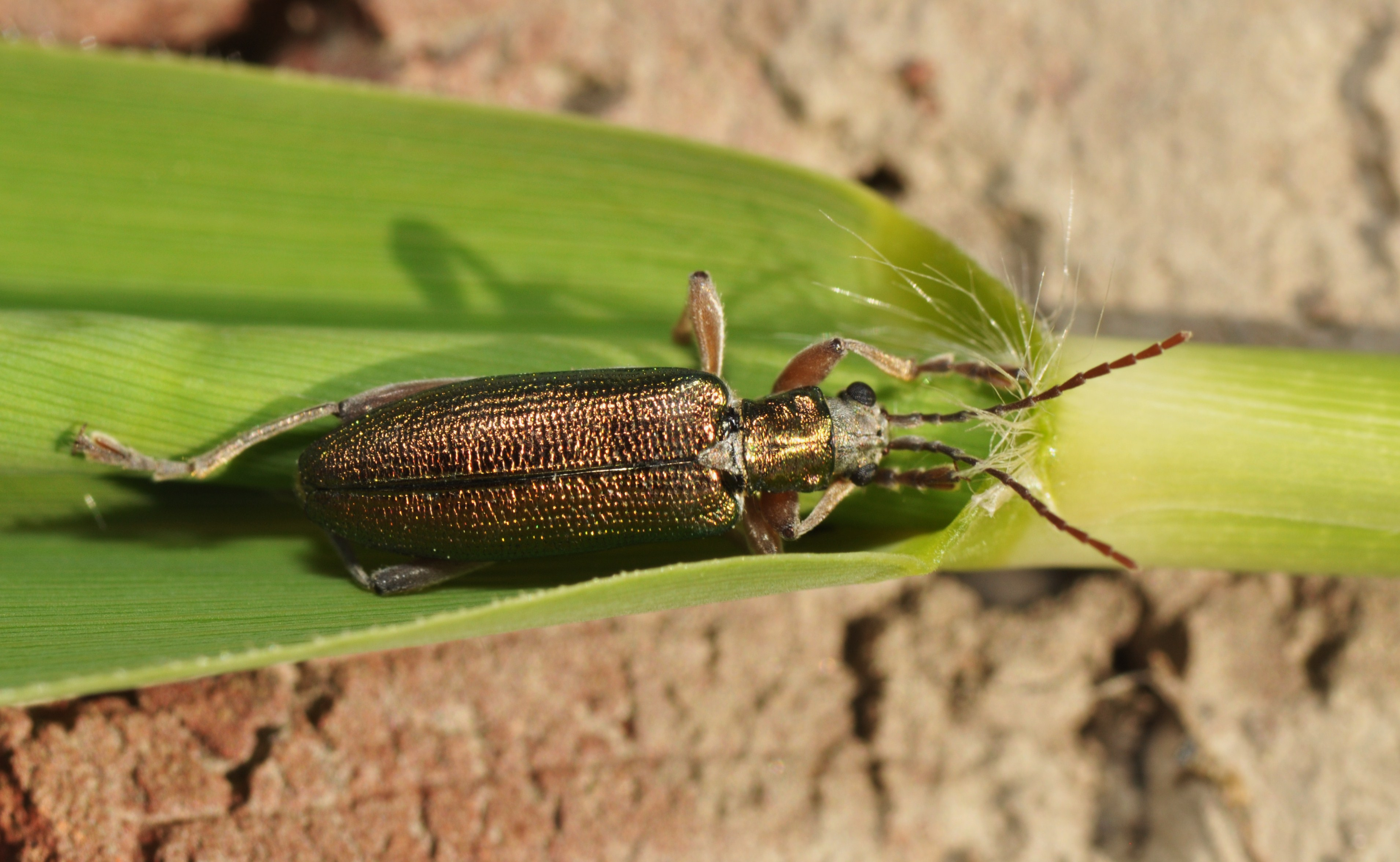 Радужница обыкновенная